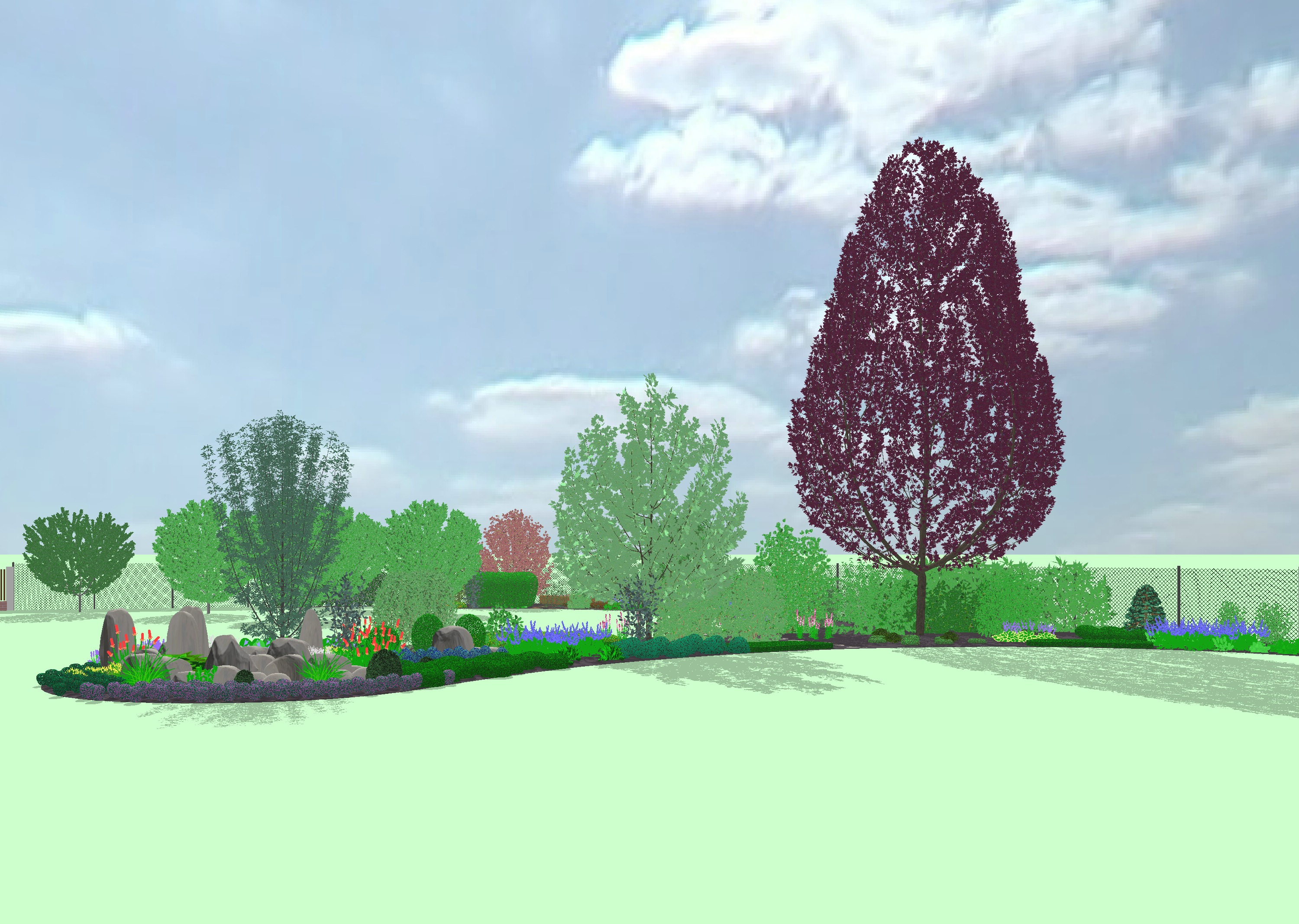 Sadovnická projekce je CAD software původně vyvíjený v ČR původně pro DOS Karlem Rysem ve spolupráci s Českou zahradnickou akademií Mělník.